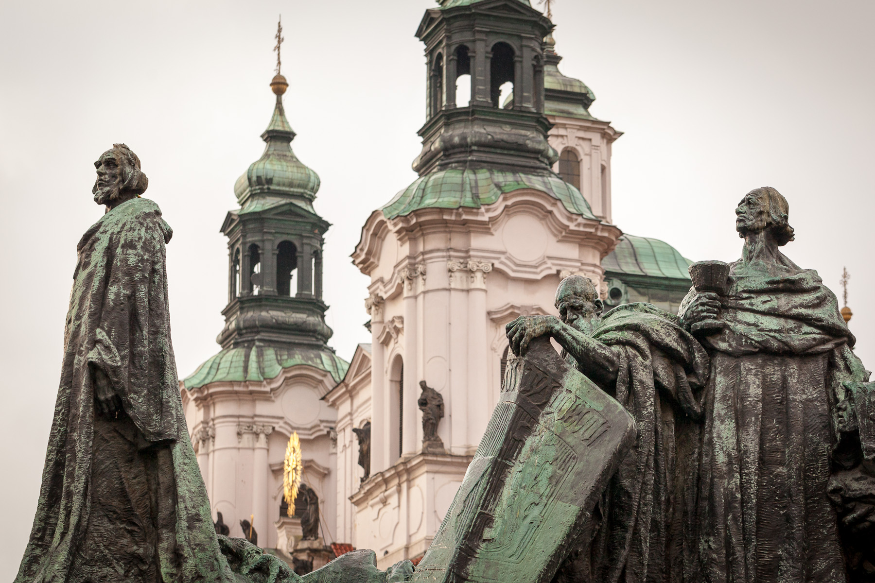 Prague